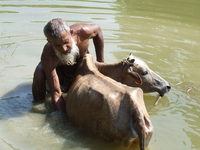 Farmer, Bangladesh.